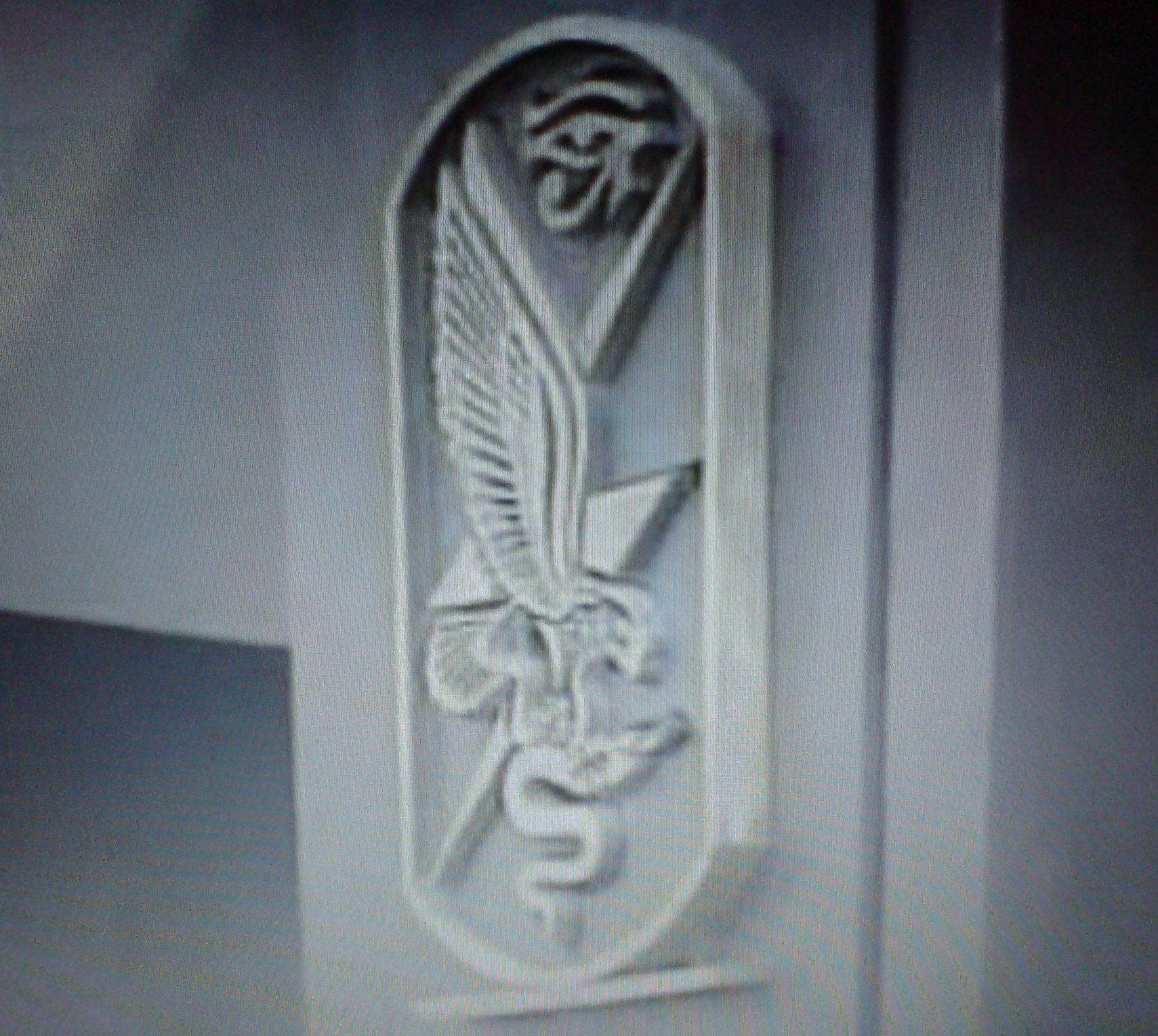 ترخيص: شعار المخابرات العامة المصرية Pseudo-cartouche emblem of Egyptian intelligence, with eye of Horus